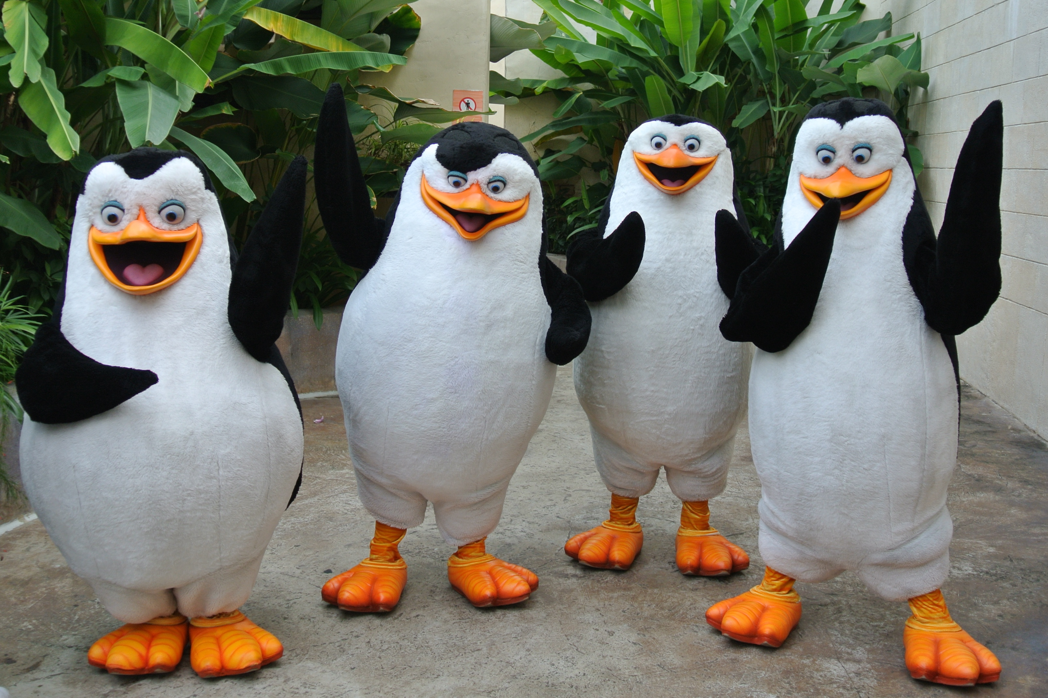 Madagascar penguins